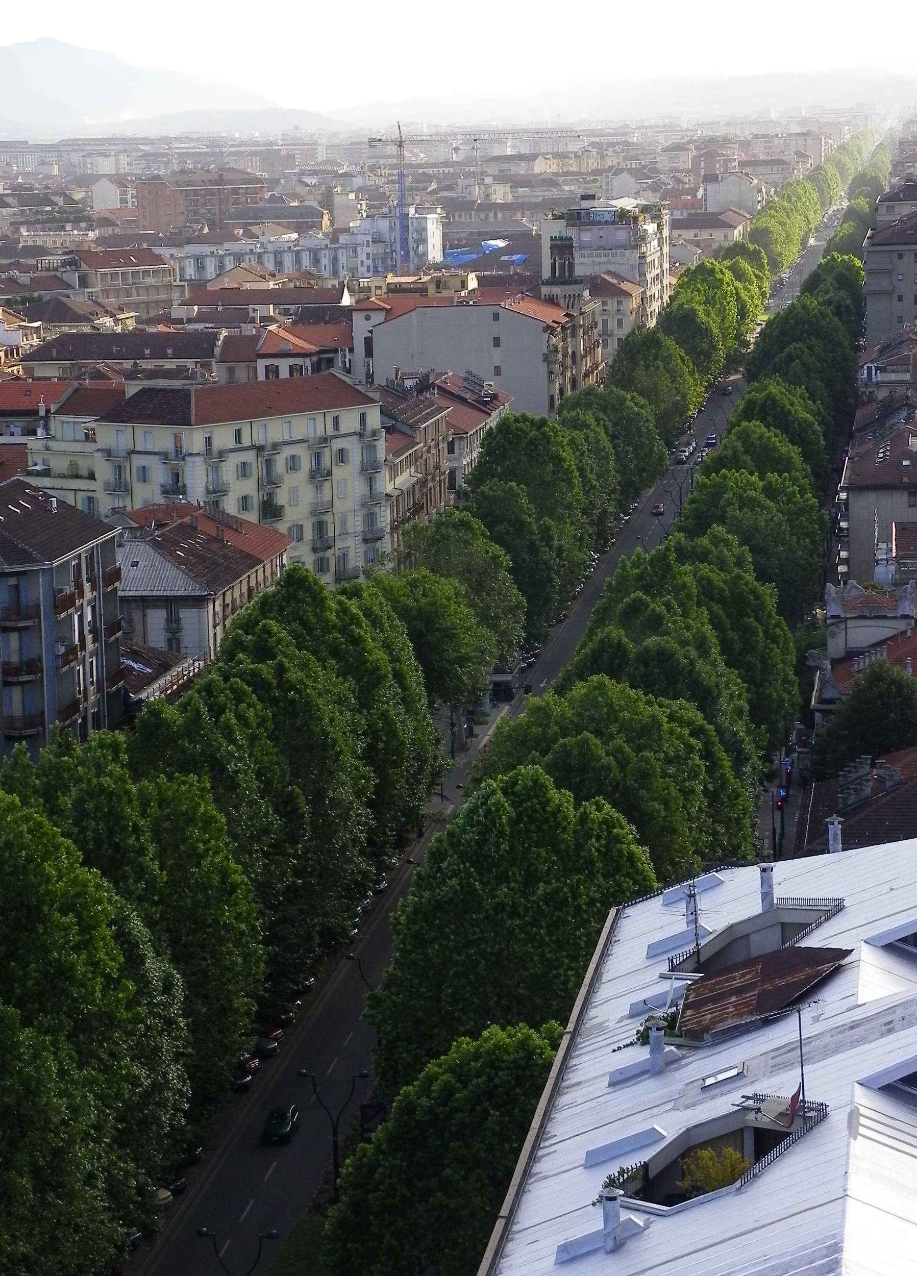 Corso Francia a Torino, vista da Piazza Statuto